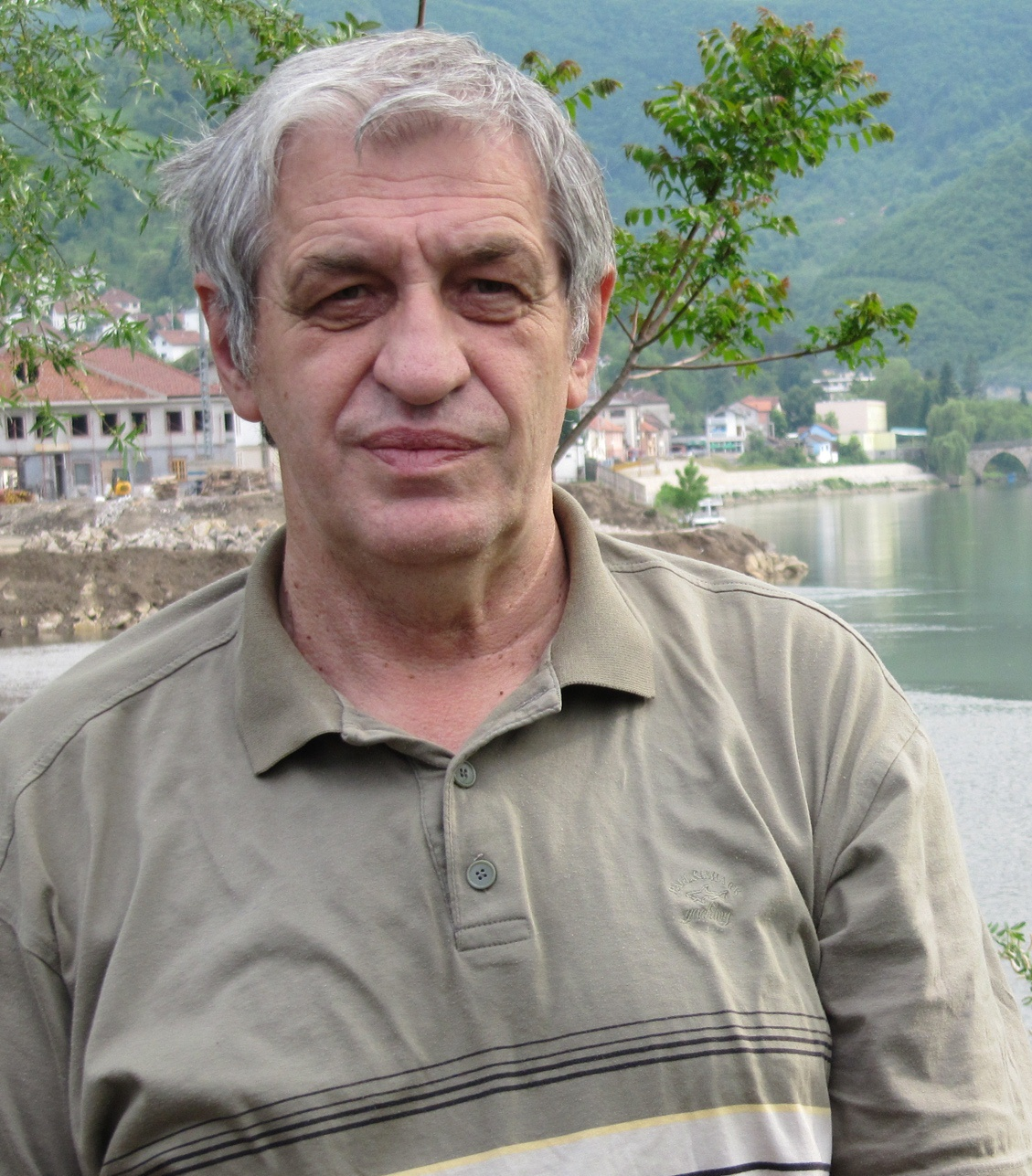 Visegrad, 21. maja 2012.